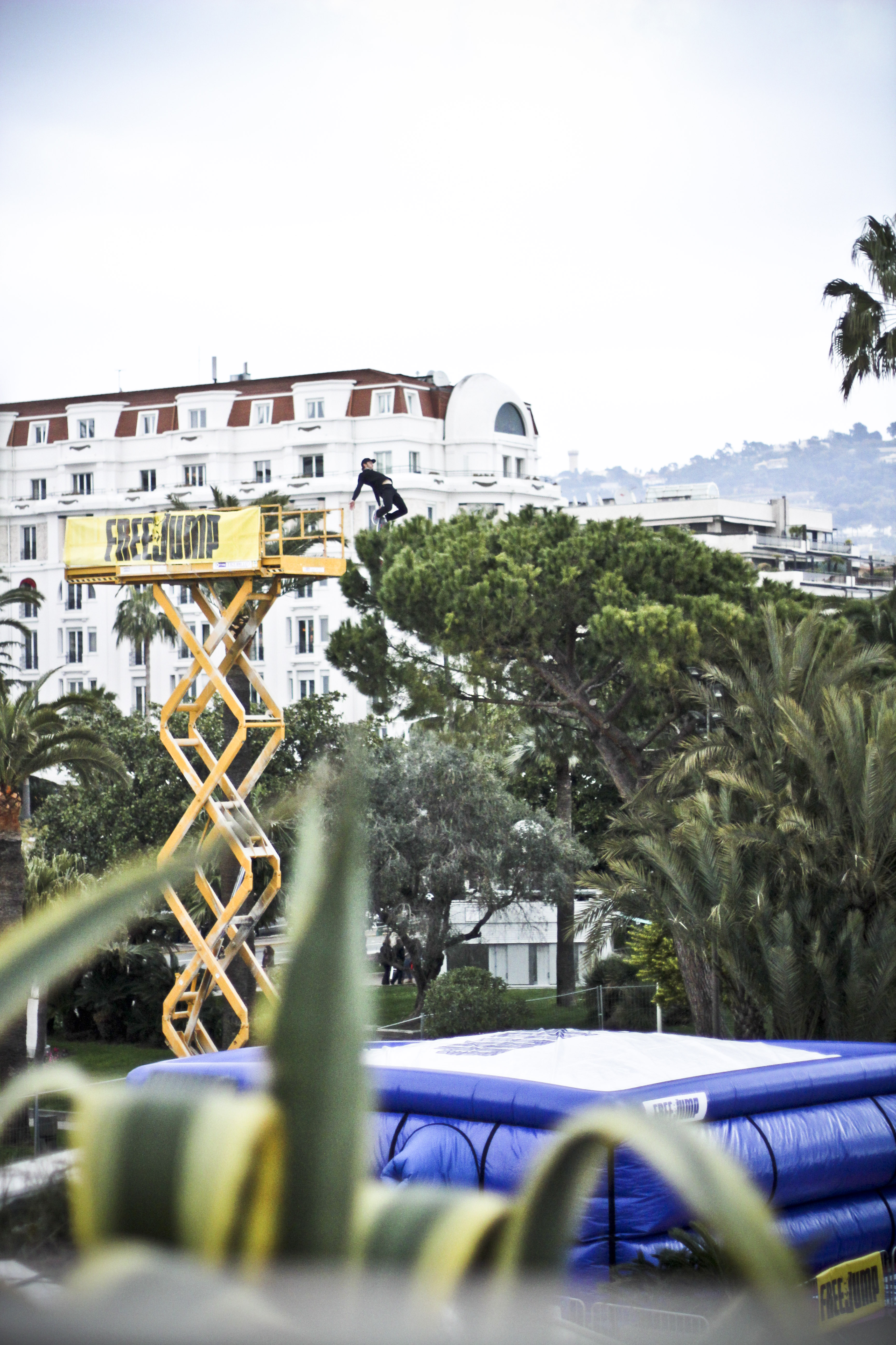 Sur la croisade des anglais à Cannes